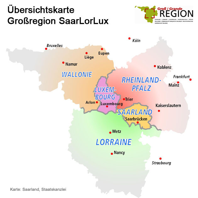 Großregion: geografische Karte